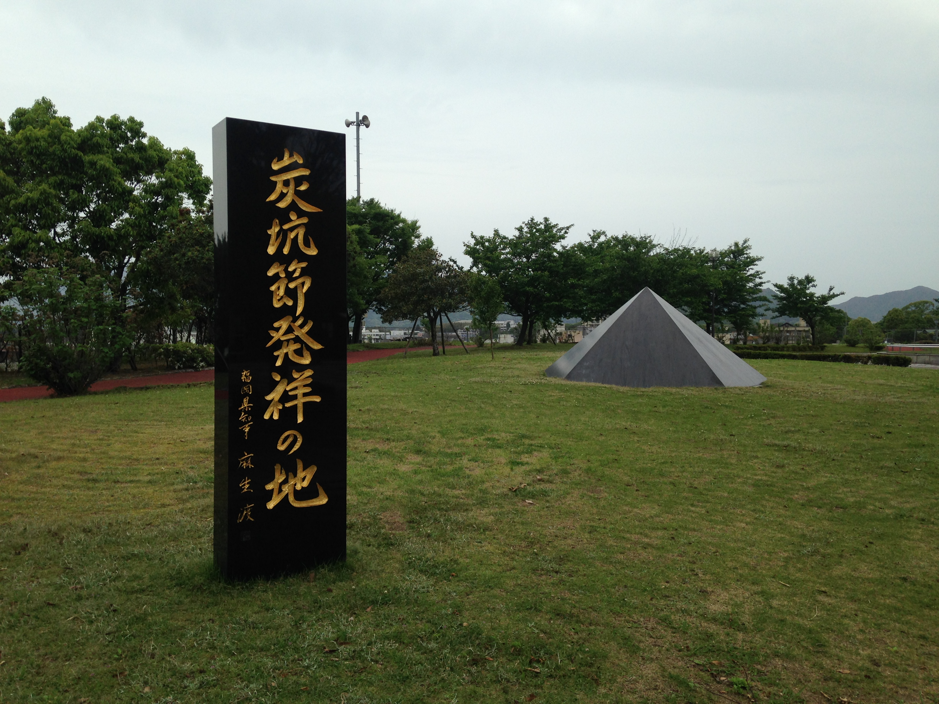 石炭記念公園にある「炭坑節発祥の地碑」